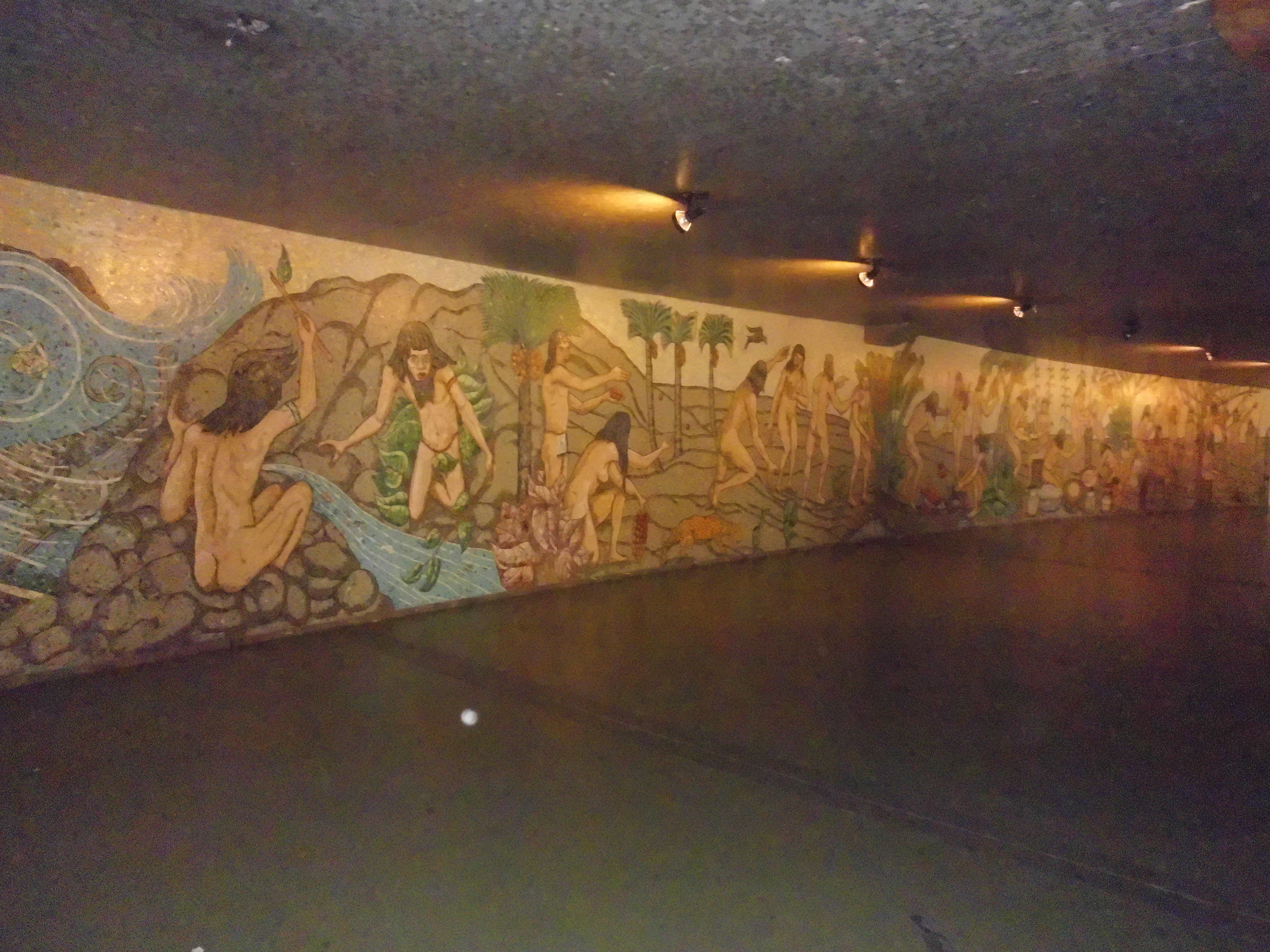 El mito de Amalivaca (1955) Mural de César Rengifo el cual se encuentra en la parte oeste de la Plaza Diego Ibarra, Caracas Distrito Capital - Venezuela El mito de Amalivaca es un mural de 28 metros de largo que cuenta la historia de la tribu Tamanaco y deleita a las y los transeúntes del Centro Simón Bolívar.